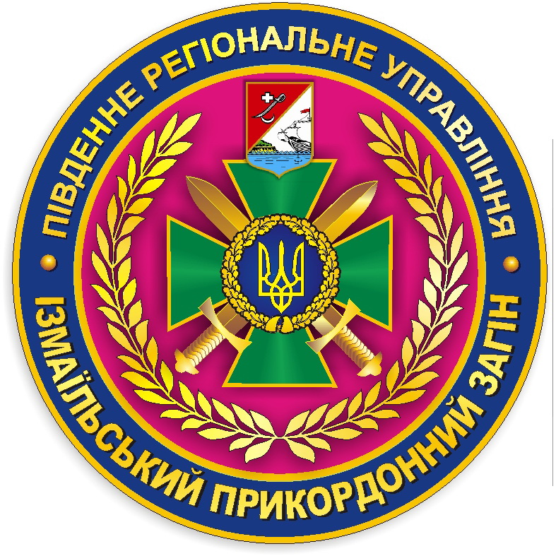 Емблема Ізмаїльського прикордонного загону Державної прикордонної служби України